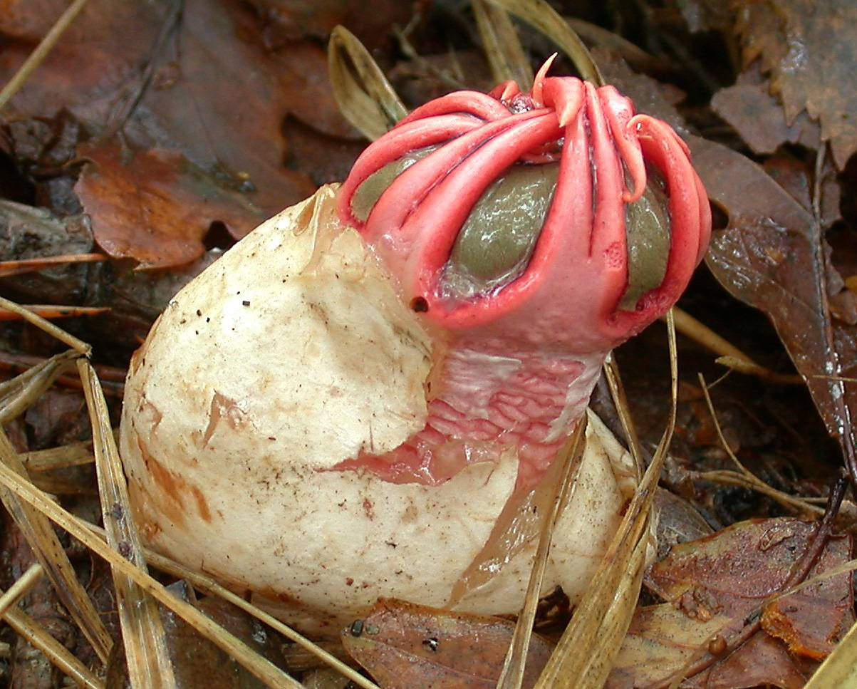 Aseroe rubra Labill.